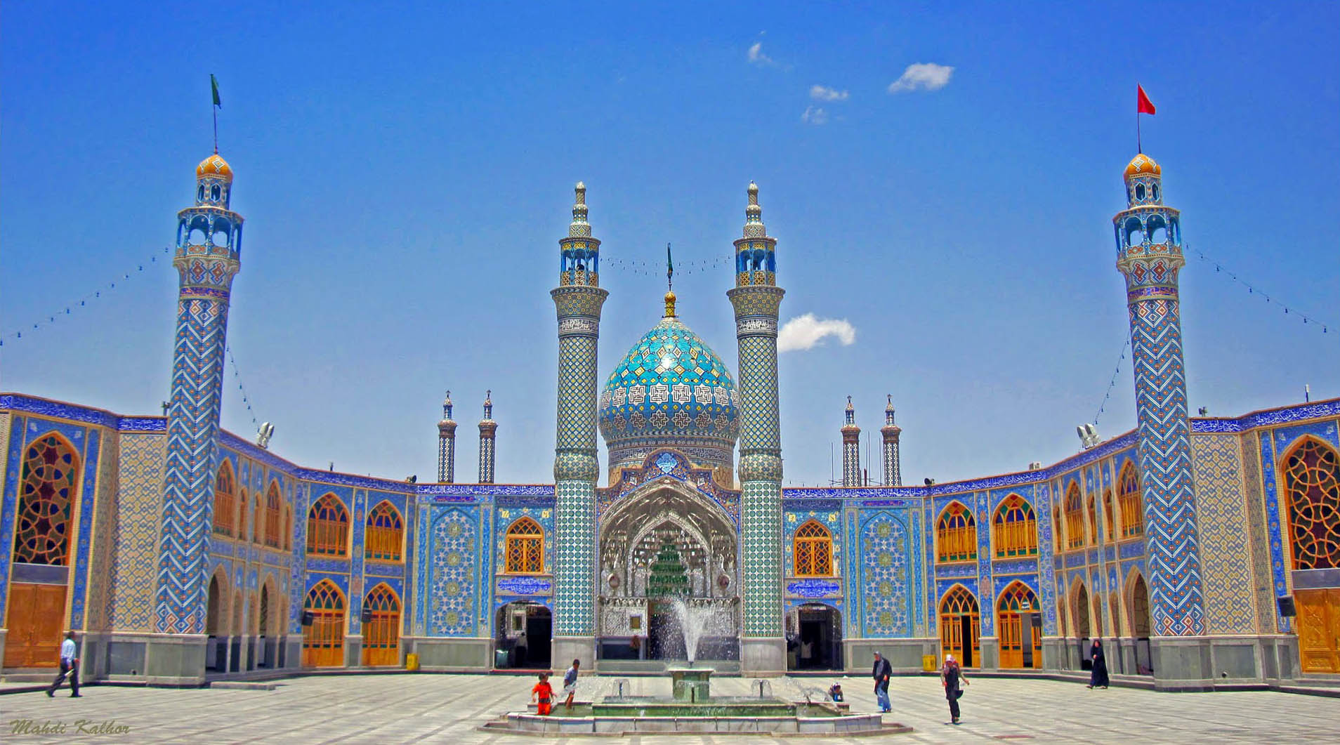 امامزاده هلال علی واقع در شهر آران و بیدگل